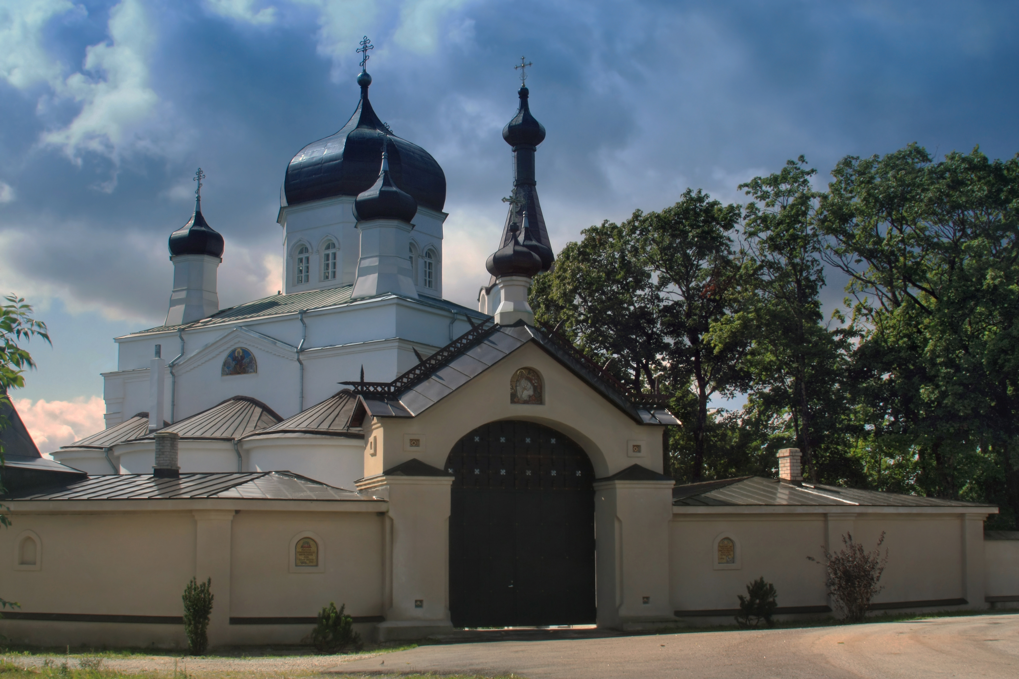 Prohvet Eeliase kirik ning klooster Vasknarvas